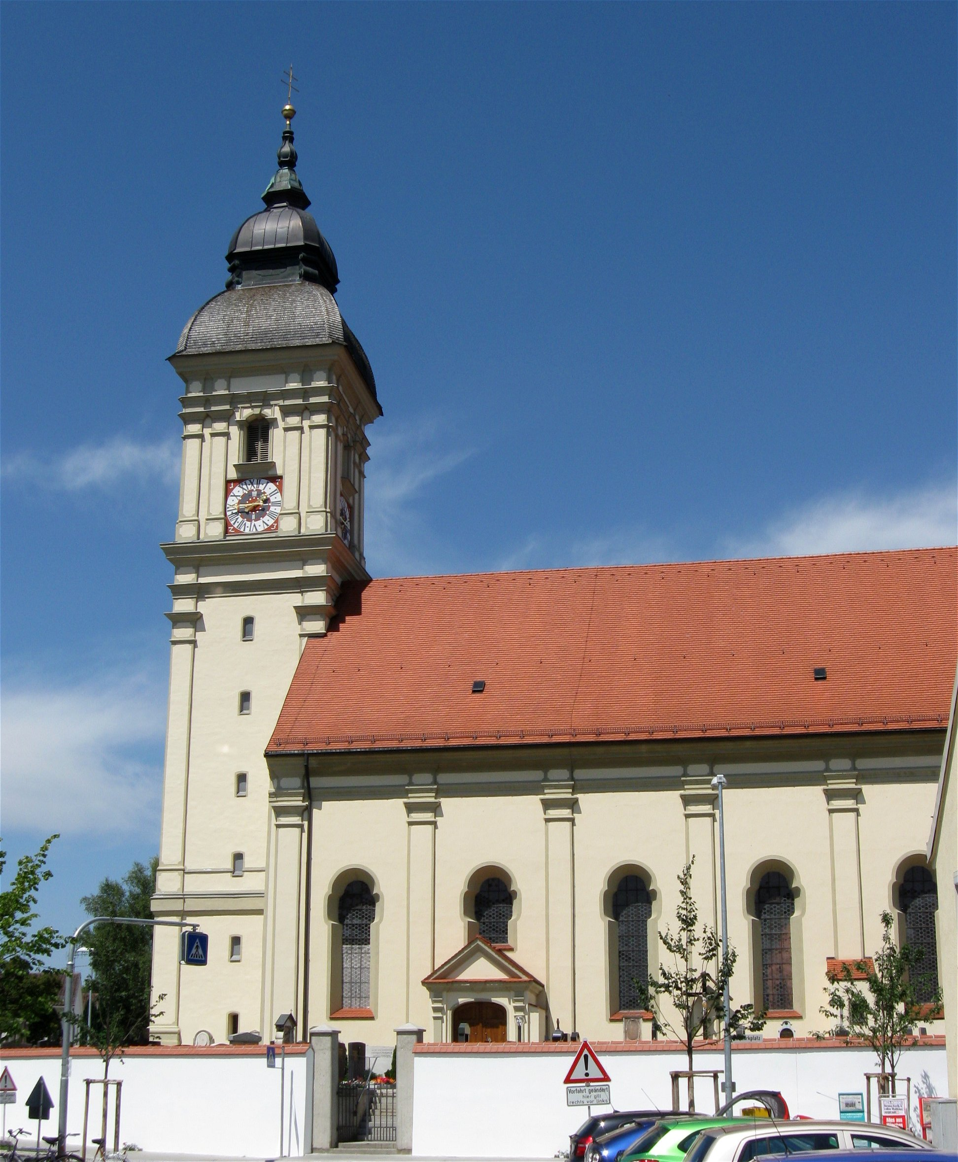 Kath. Pfarrkirche St. Mariae Verkündigung, Altenerding, stattlicher Bau von Anton Kogler, 1724; mit Ausstattung.